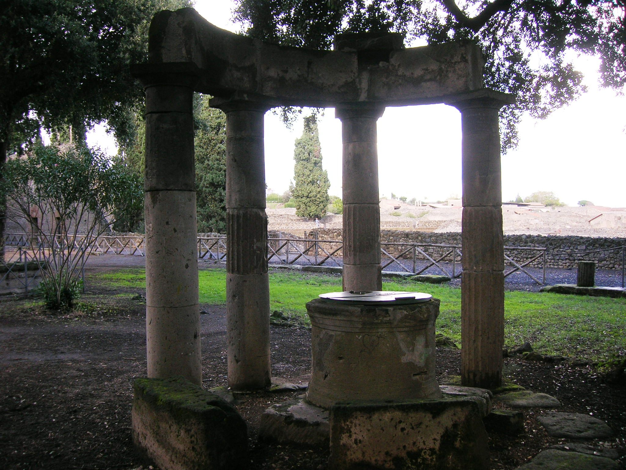 Le rovine del cosiddetto "Tempio dorico" a Pompei.